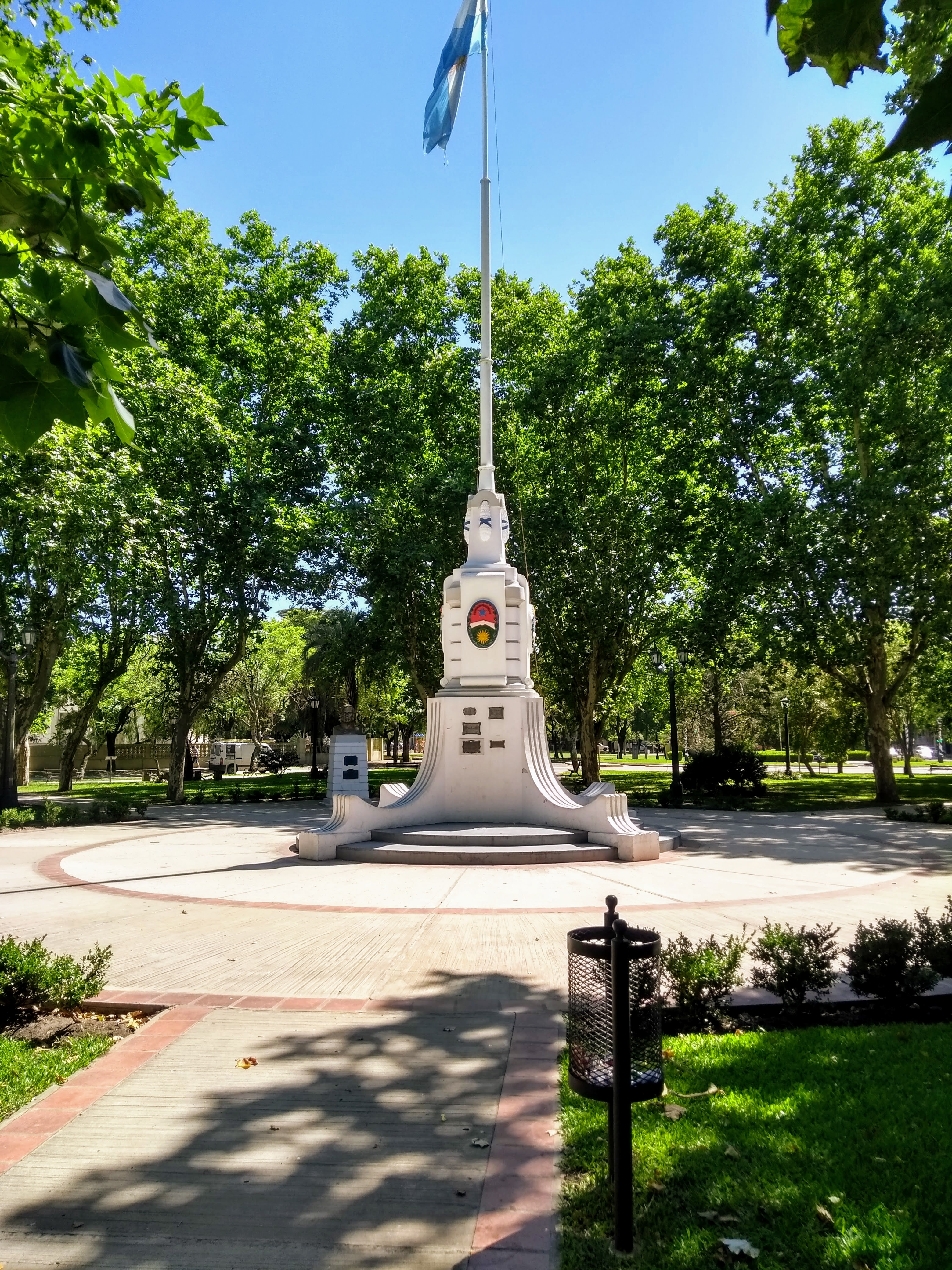 Mástil de la Plaza «Presidente Justo J. de Urquiza» de la ciudad de Villa Elisa, Provincia de Entre Ríos, en diciembre de 2018.